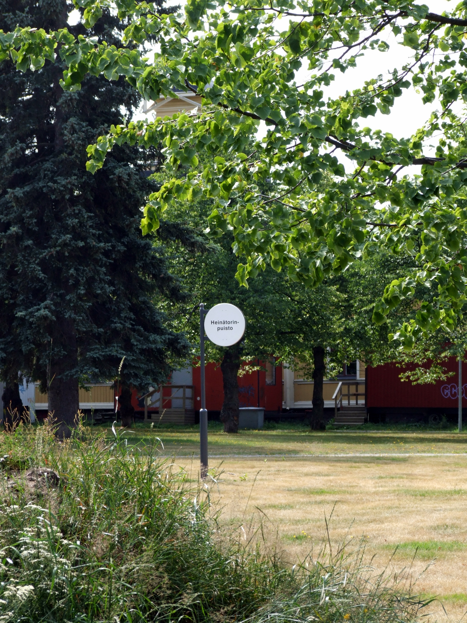 Heinätorinpuisto park in Oulu, Finland.